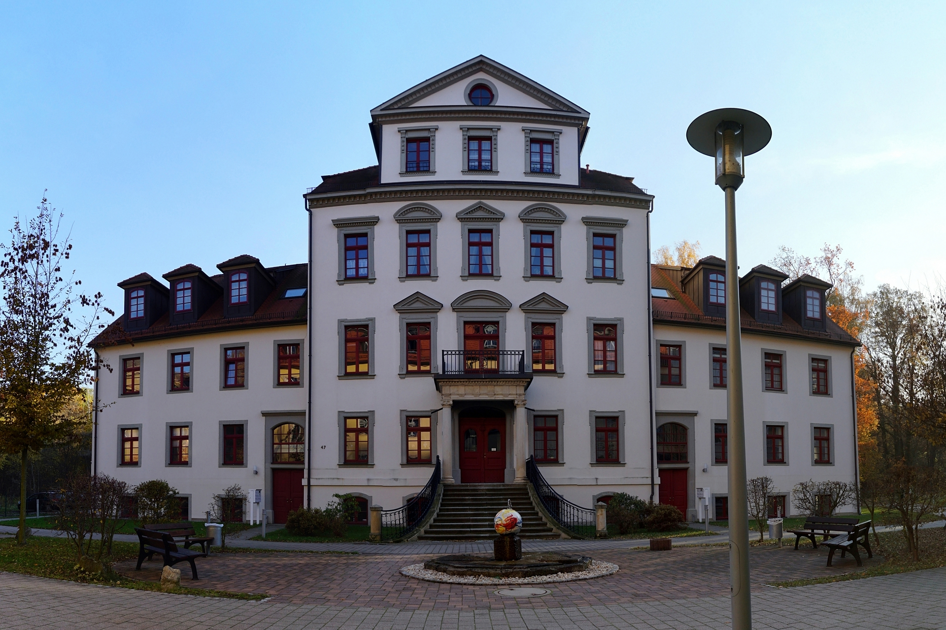 Herrenhaus der ehemaligen Bernhardschen Spinnerei in Chemnitz-Harthau, erbaut 1806/07, 2015